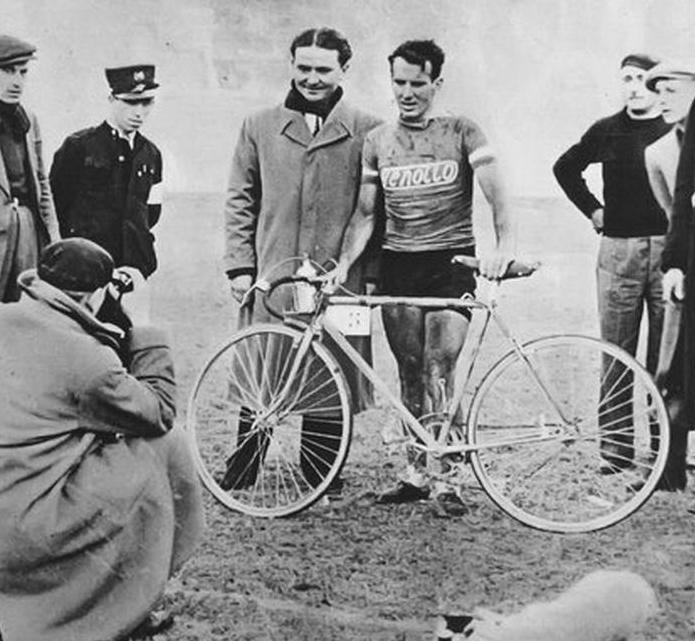 Giuseppe Martano à l'arrivée de Milan-Turin en 1937 (vainqueur de l'épreuve).